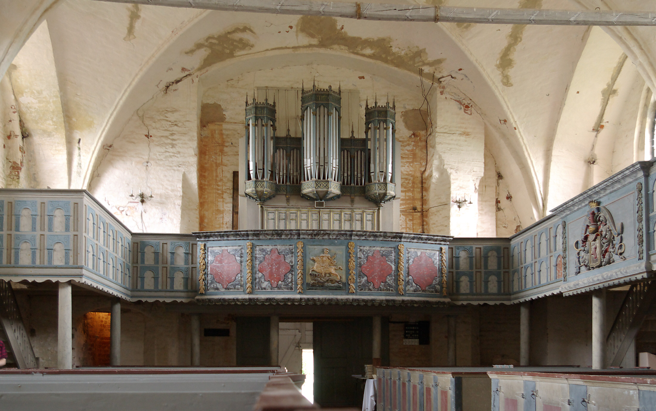 Empore und Orgel der St. Marienkirche